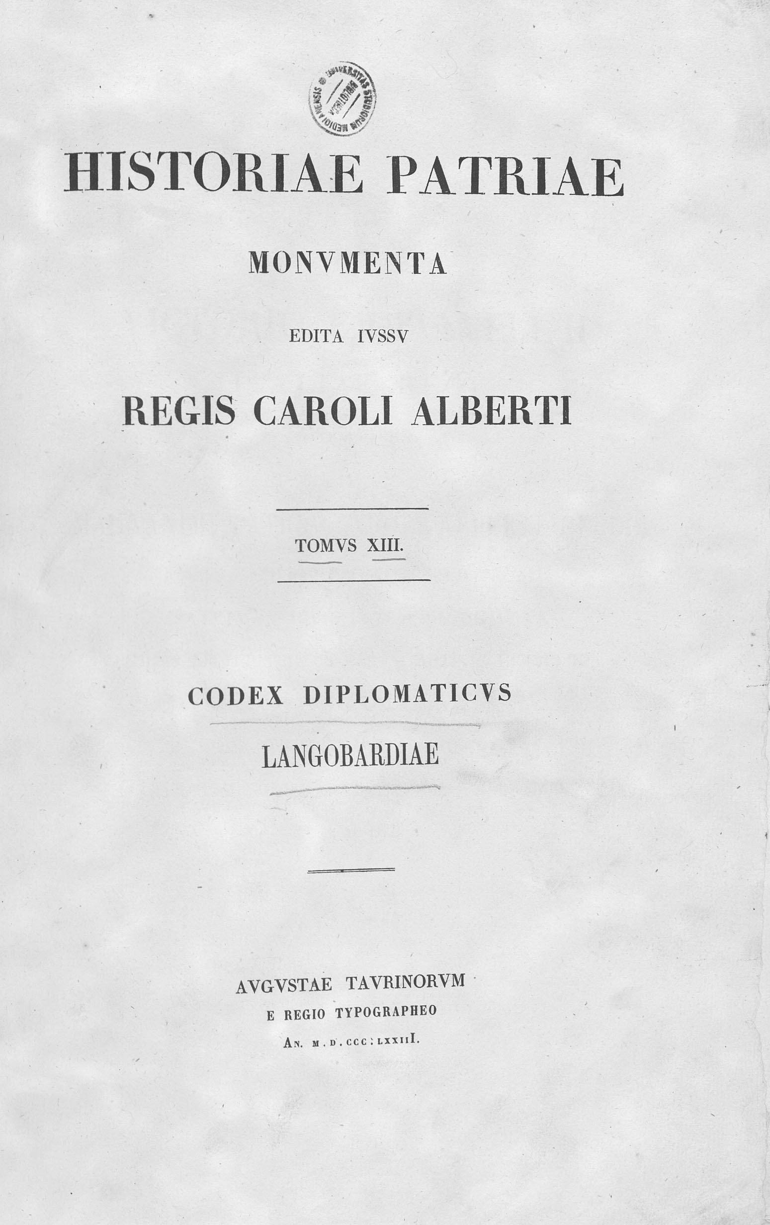 Frontespizio